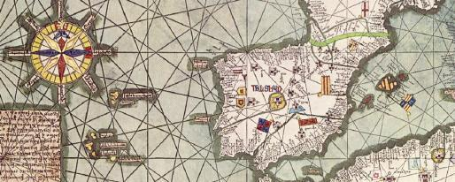 Detail de l'Atlas d'Abraham Crescas.